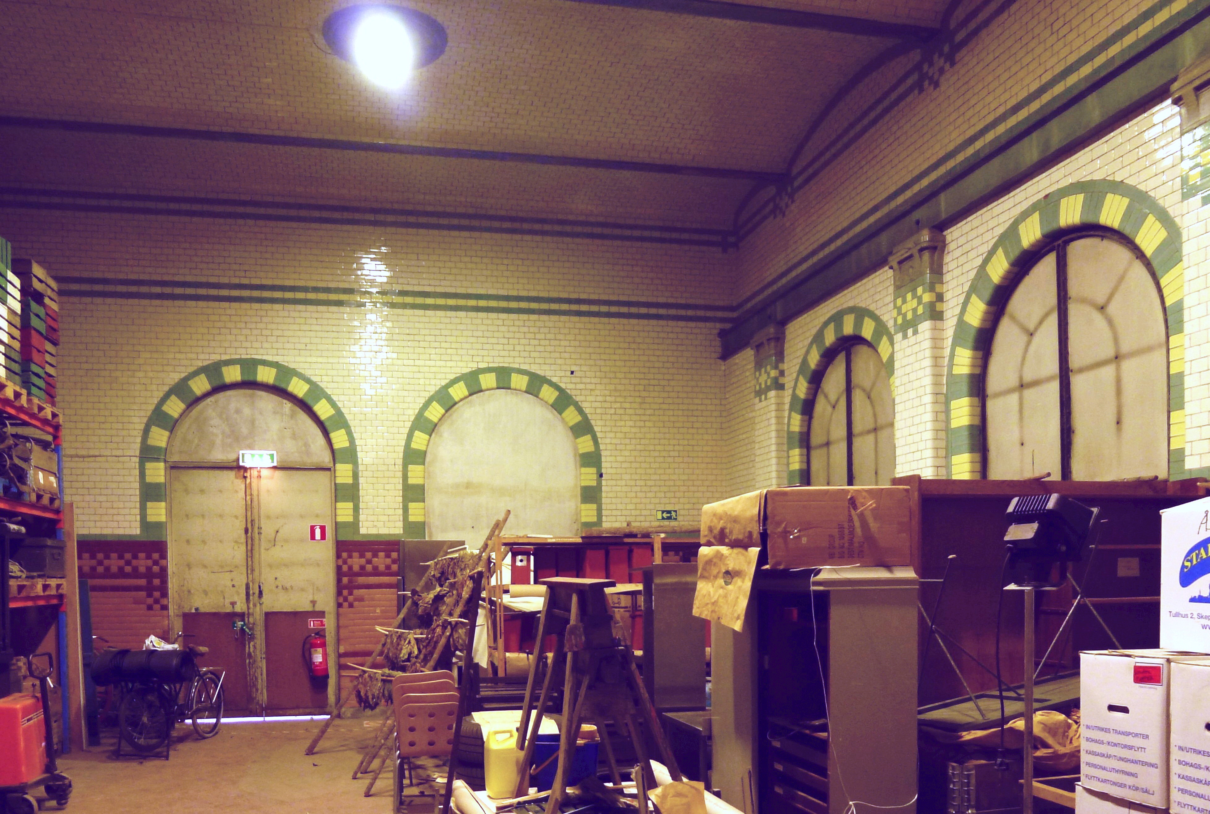 Djurgårdsstationen, Ferdinand Bobergs understation vid Singelbacken 15 på Södra Djurgården, maskinhallen